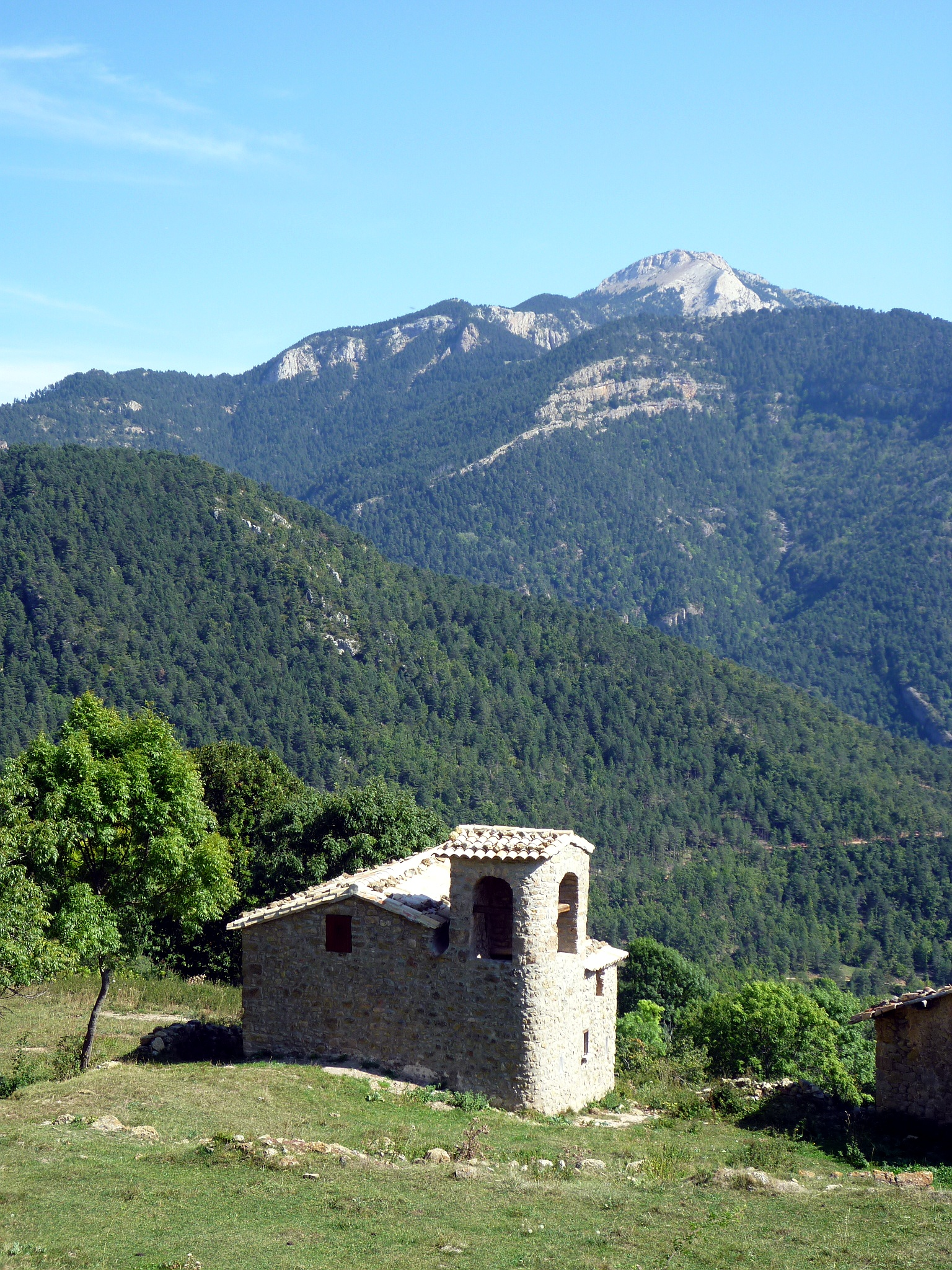 Esglèsia de Sant Vicenç de Moripol amb la serra d'Ensija al fons.